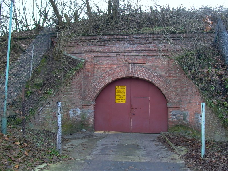 Fotografia przedstawia bramę fortu IIA Twierdzy Warszawa. Autor: Zbigniew Strucki